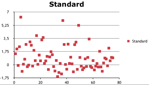 Gumbel-Realisationen (Standard)